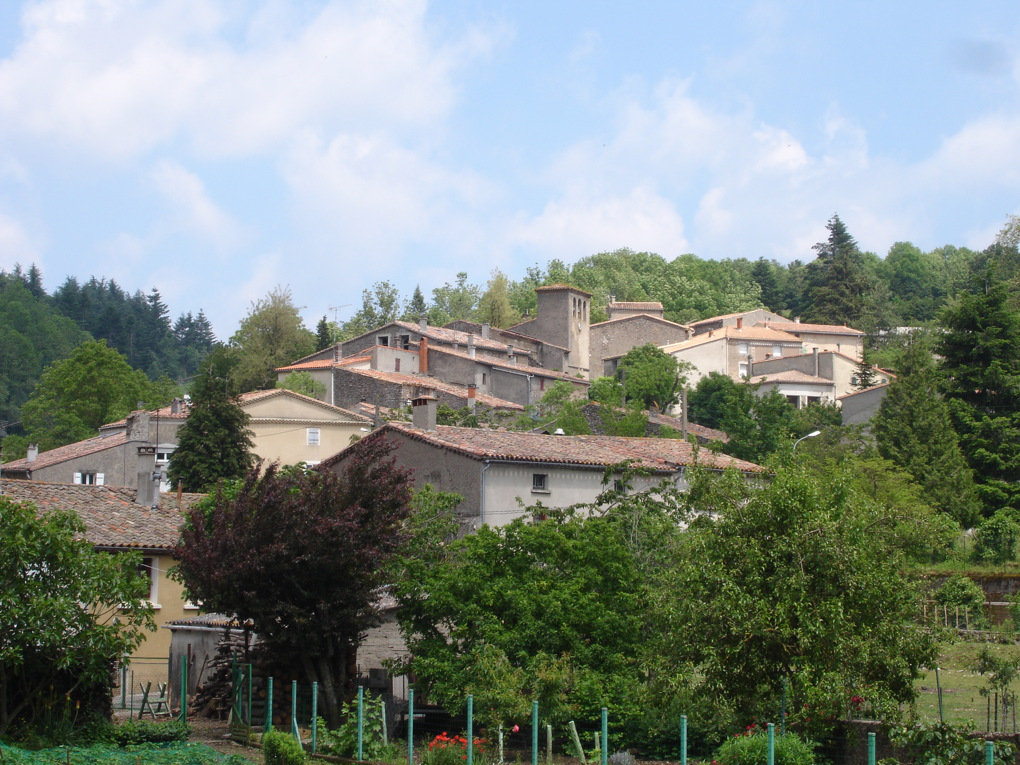 France, Aude (11), village de Villardebelle